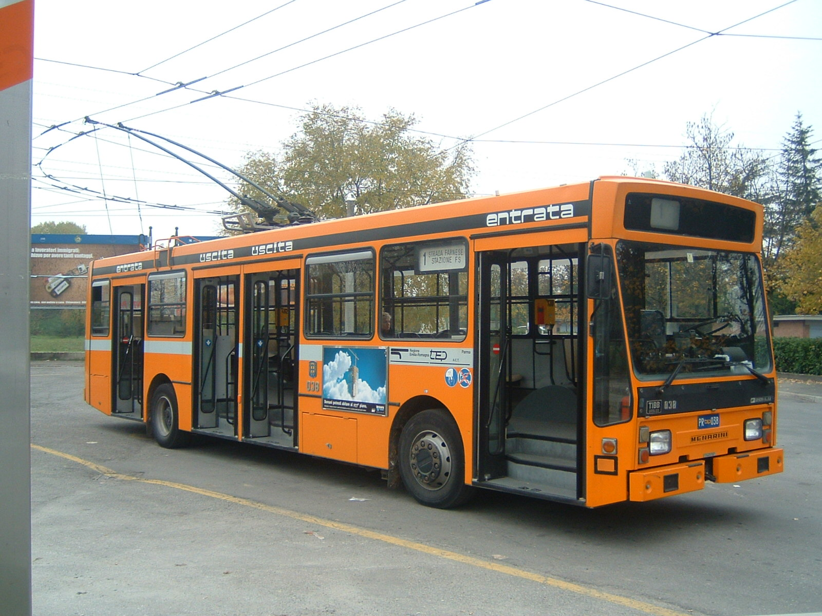 Filobus a Parma